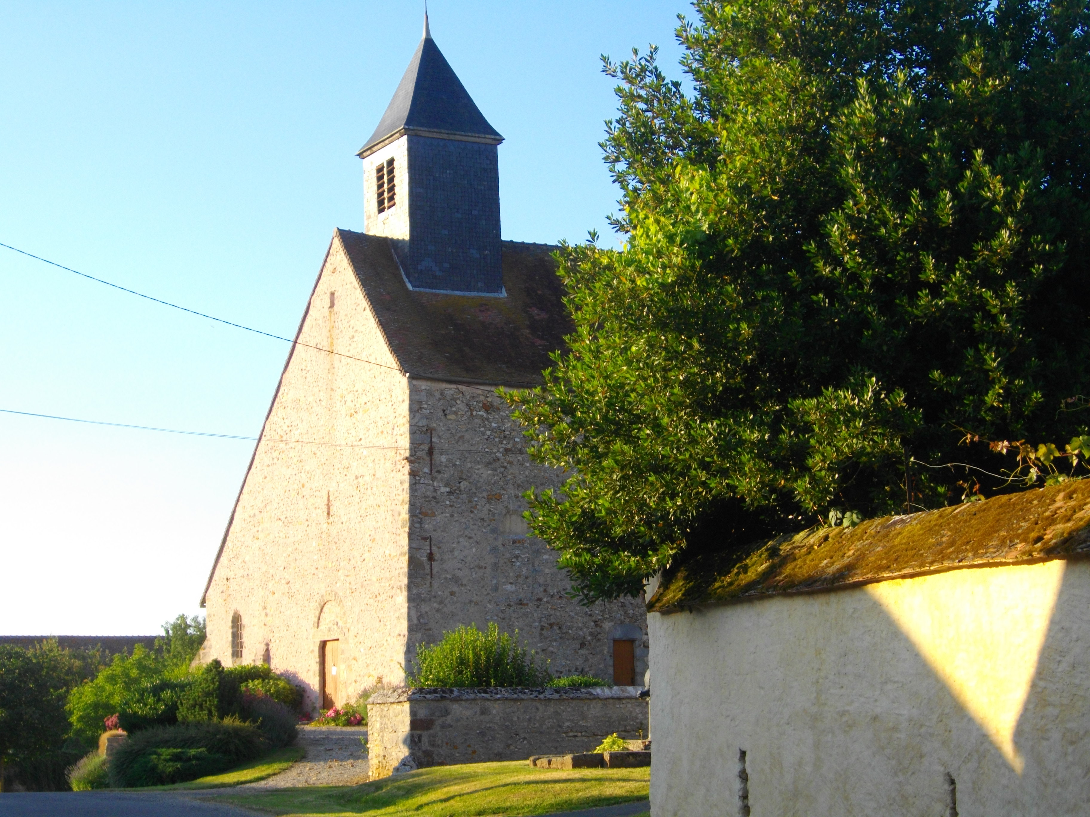 Église St-Michel.